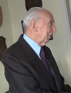 Contralmirante VGM Carlos Büsser.